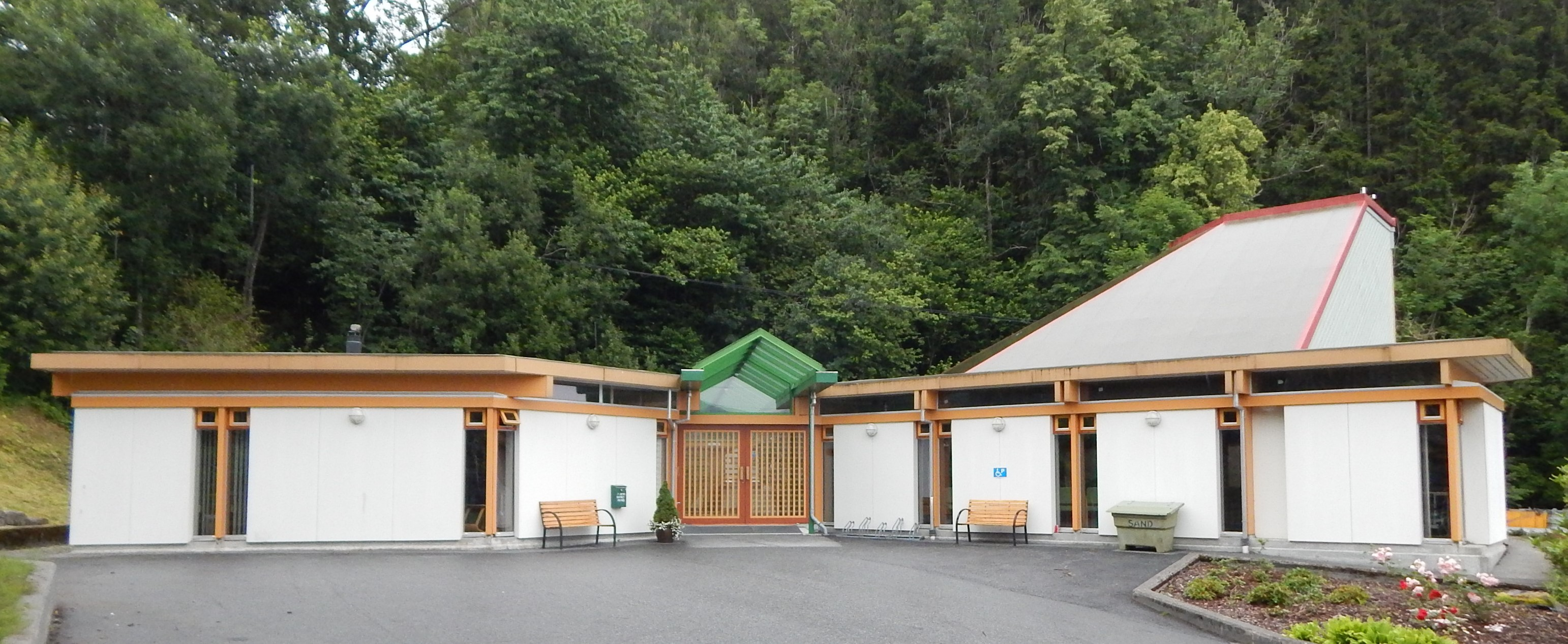 Haga kirke i Samnanger